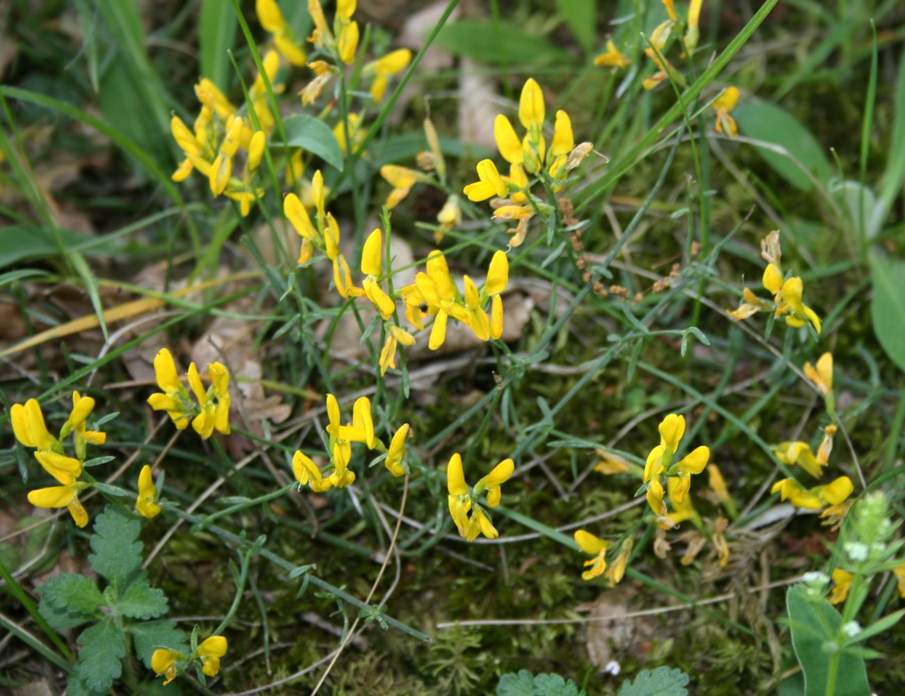 Genista januensis subsp. lydia, Hülsenfrüchtler (Fabaceae), Faboideae - Türkei/Türkiye/Turkey: Prov. Bolu/Bolu ili, SE Karacasu, S Bolu, ca. 880-890 m, Eichen-Niederwald